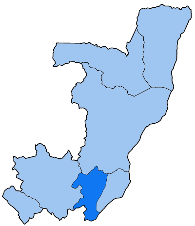 Mappa della diocesi cattolica di Kinkala, nella Repubblica del Congo.